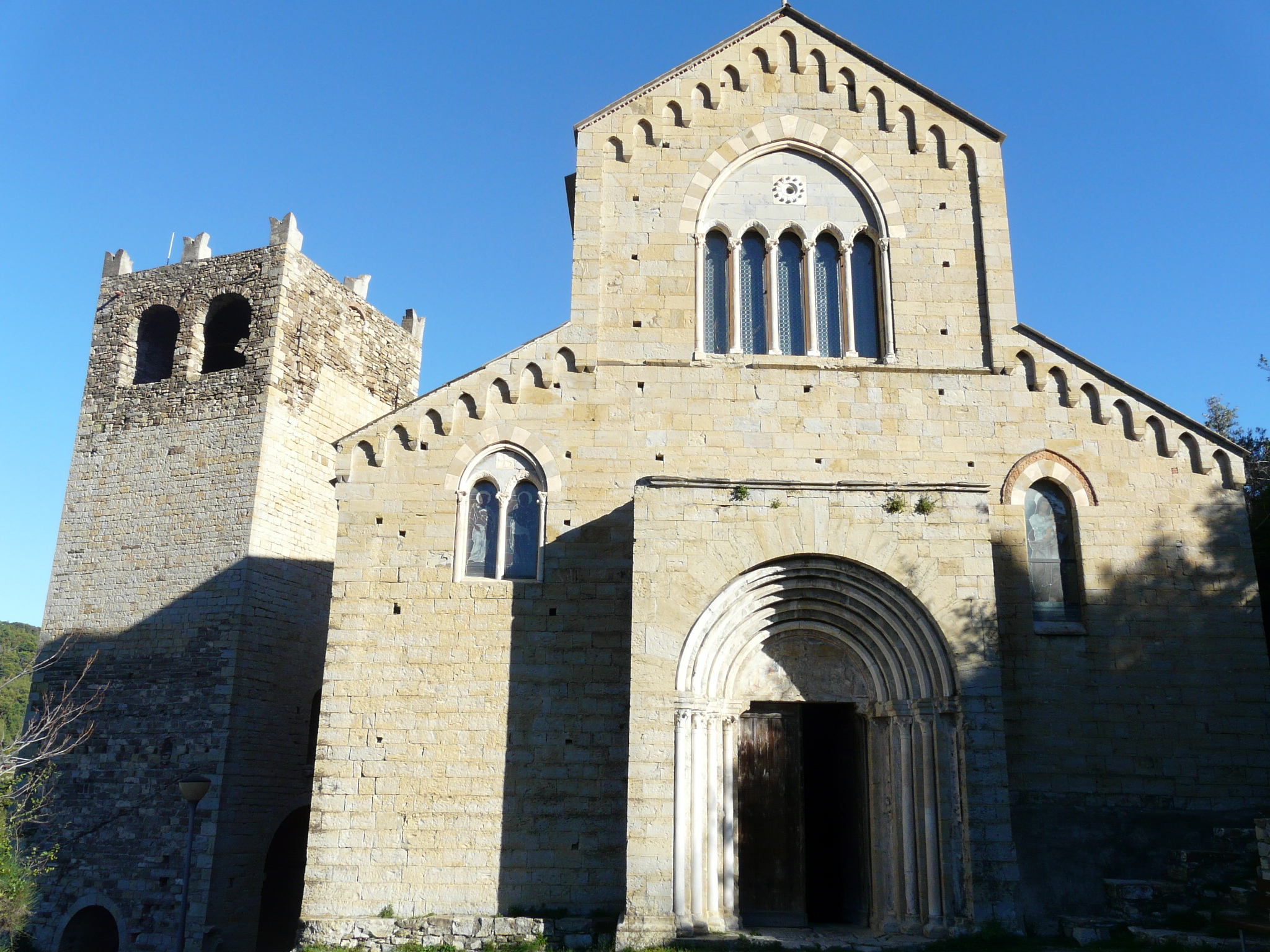 Torre medievale e chiesa romanica dei Santi Giacomo e Filippo, Andora, Liguria, Italia